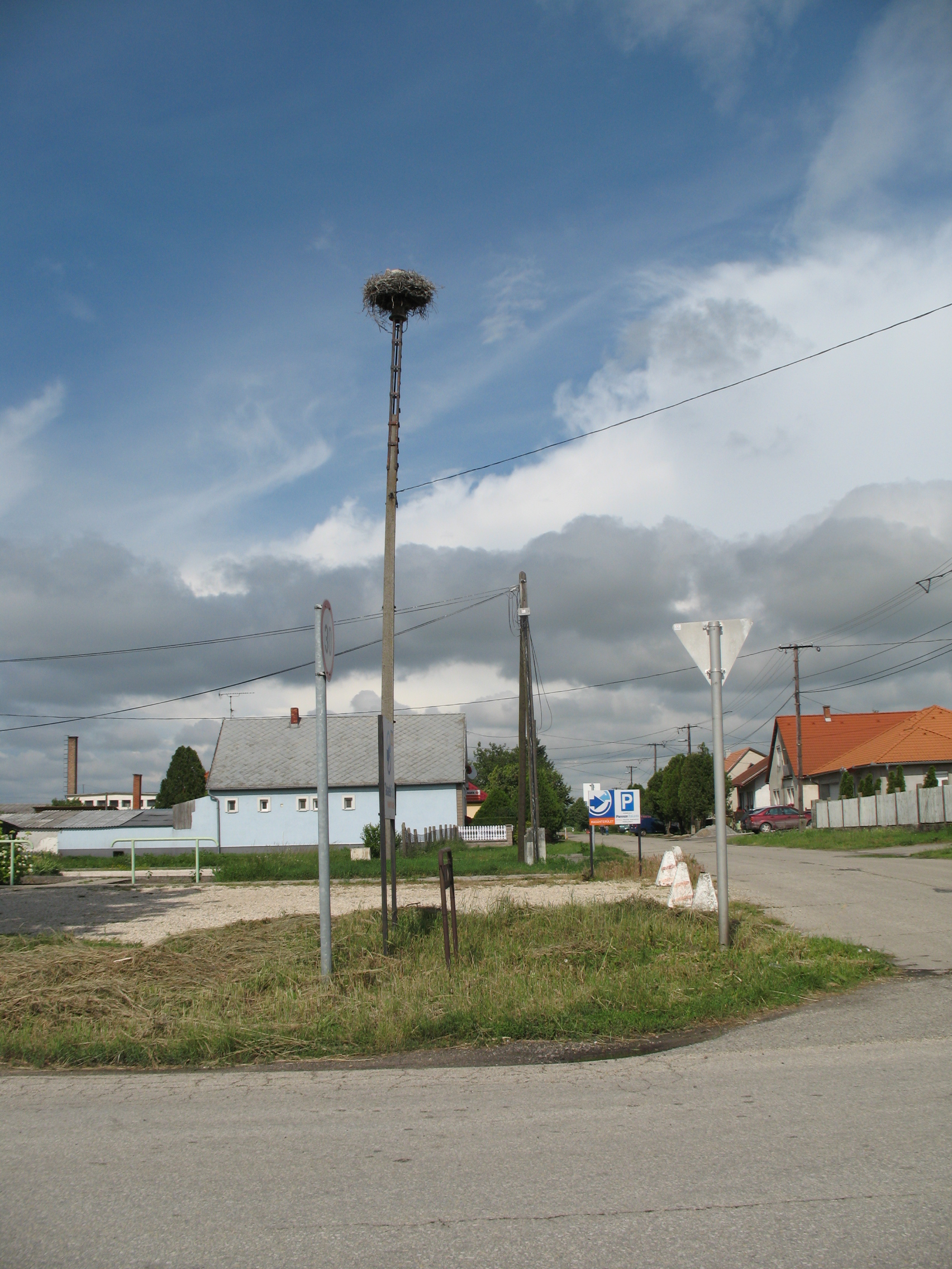 Nagyszentjános gólyafészek 2013